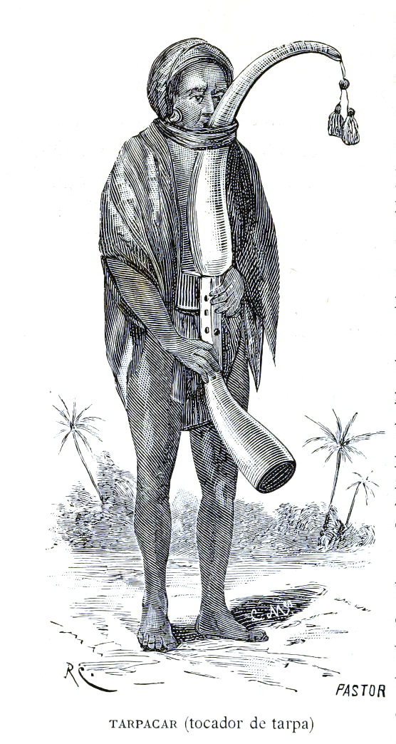 Tarpa player